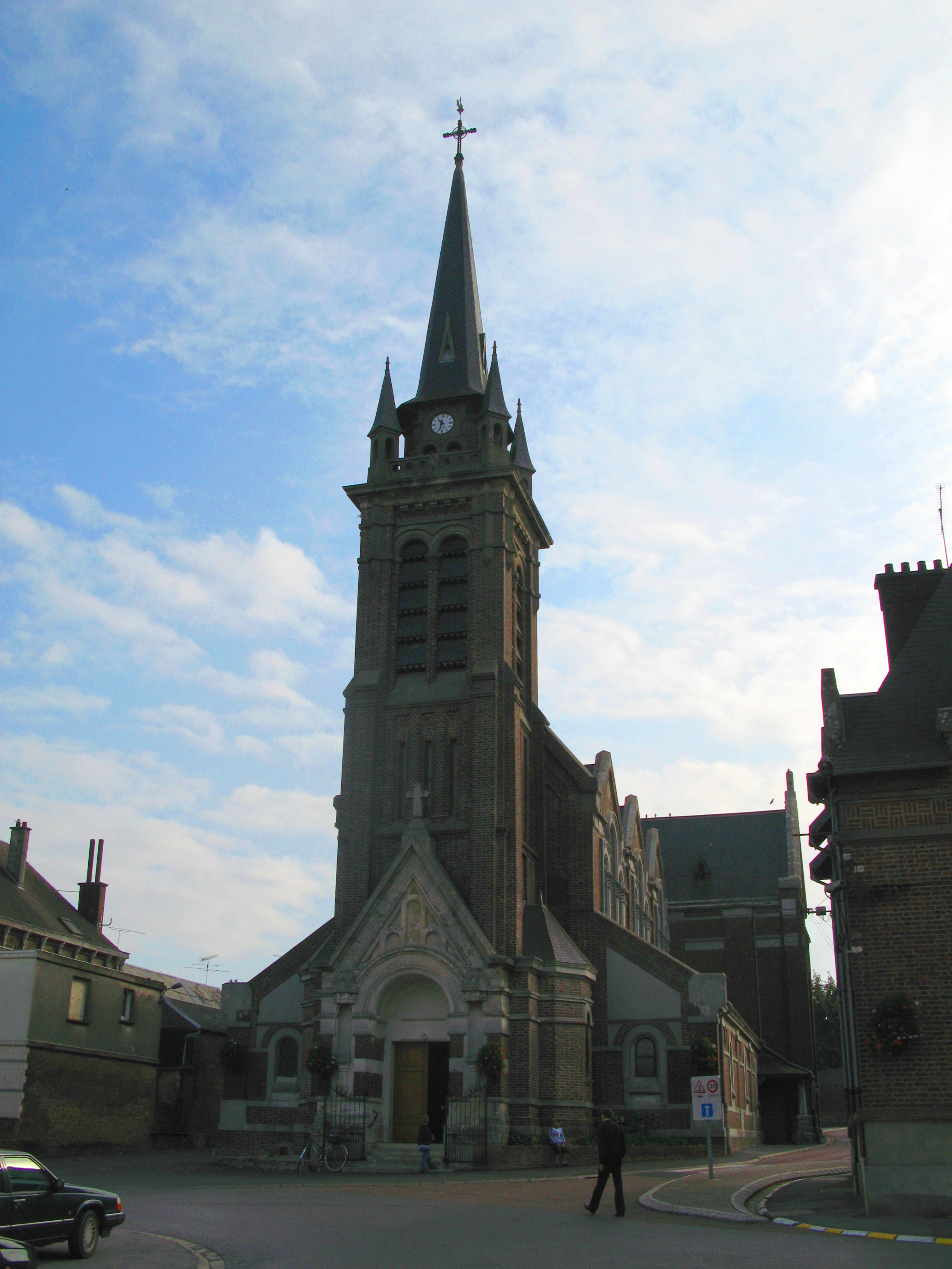 Origny-Sainte-Benoite (Aisne, France) - L'église.